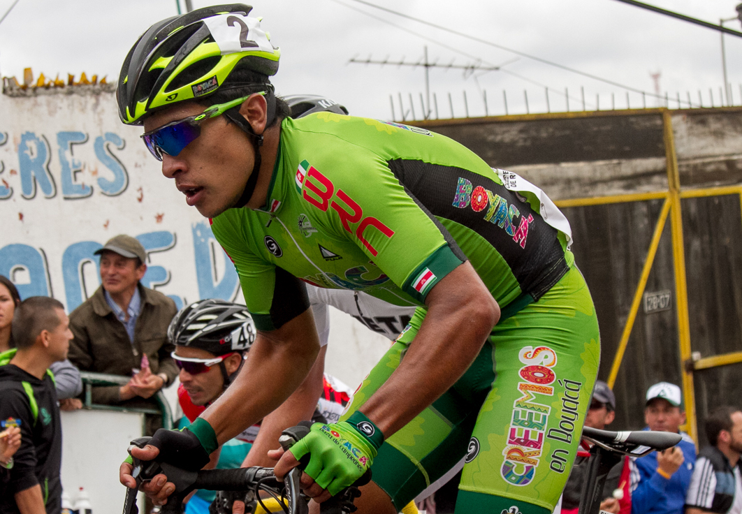 Elites Hombres Campeonatos Nacionales de Ruta Boyará 2016.